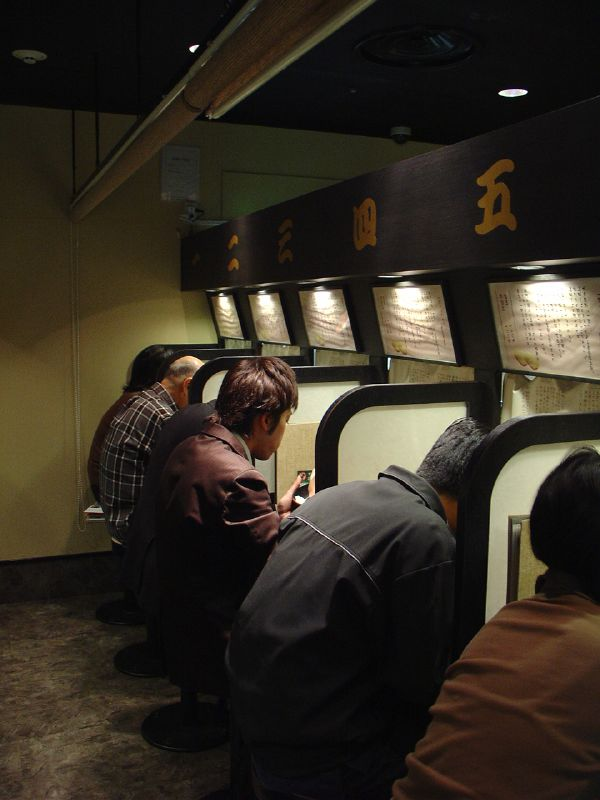 一蘭店内風景（福岡市の博多ラーメンの店「一蘭」[1]。いわゆる「味集中カウンター」）Slurping folks at Ichiran Ramen